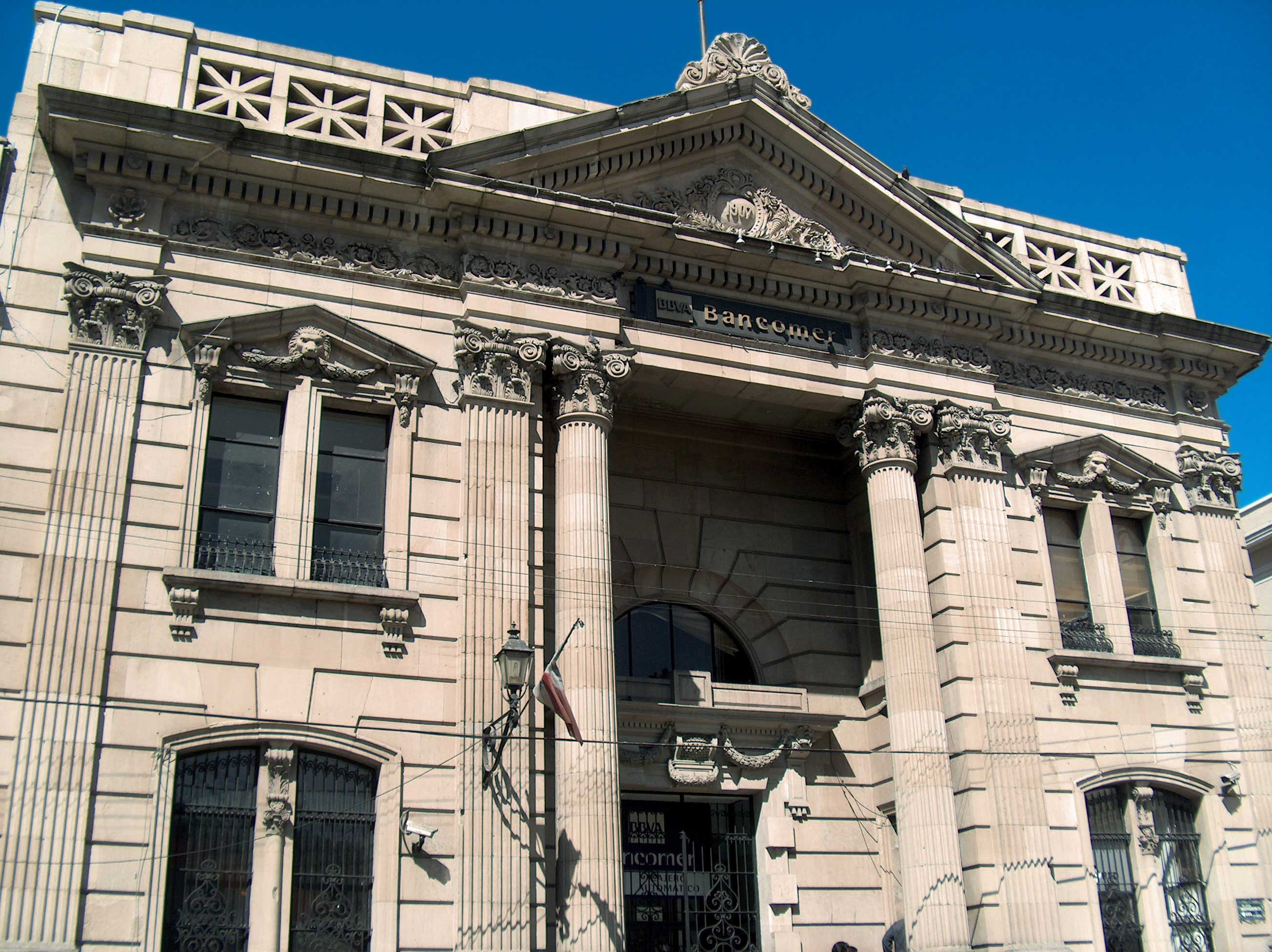 Banco de Pachuca, Pachuca Centro — estado de Hidalgo, México.